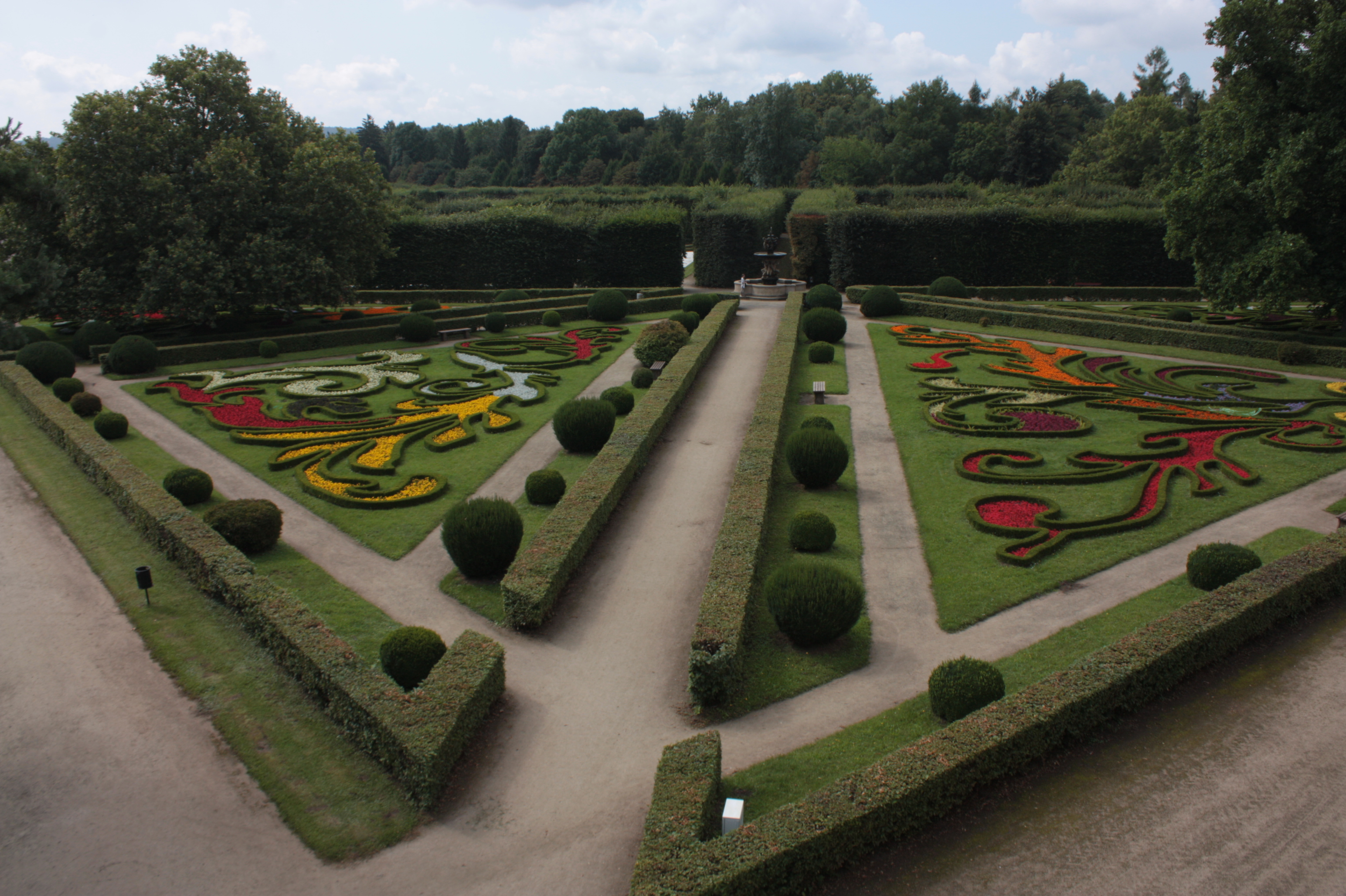 Kroměříž, Květná zahrada